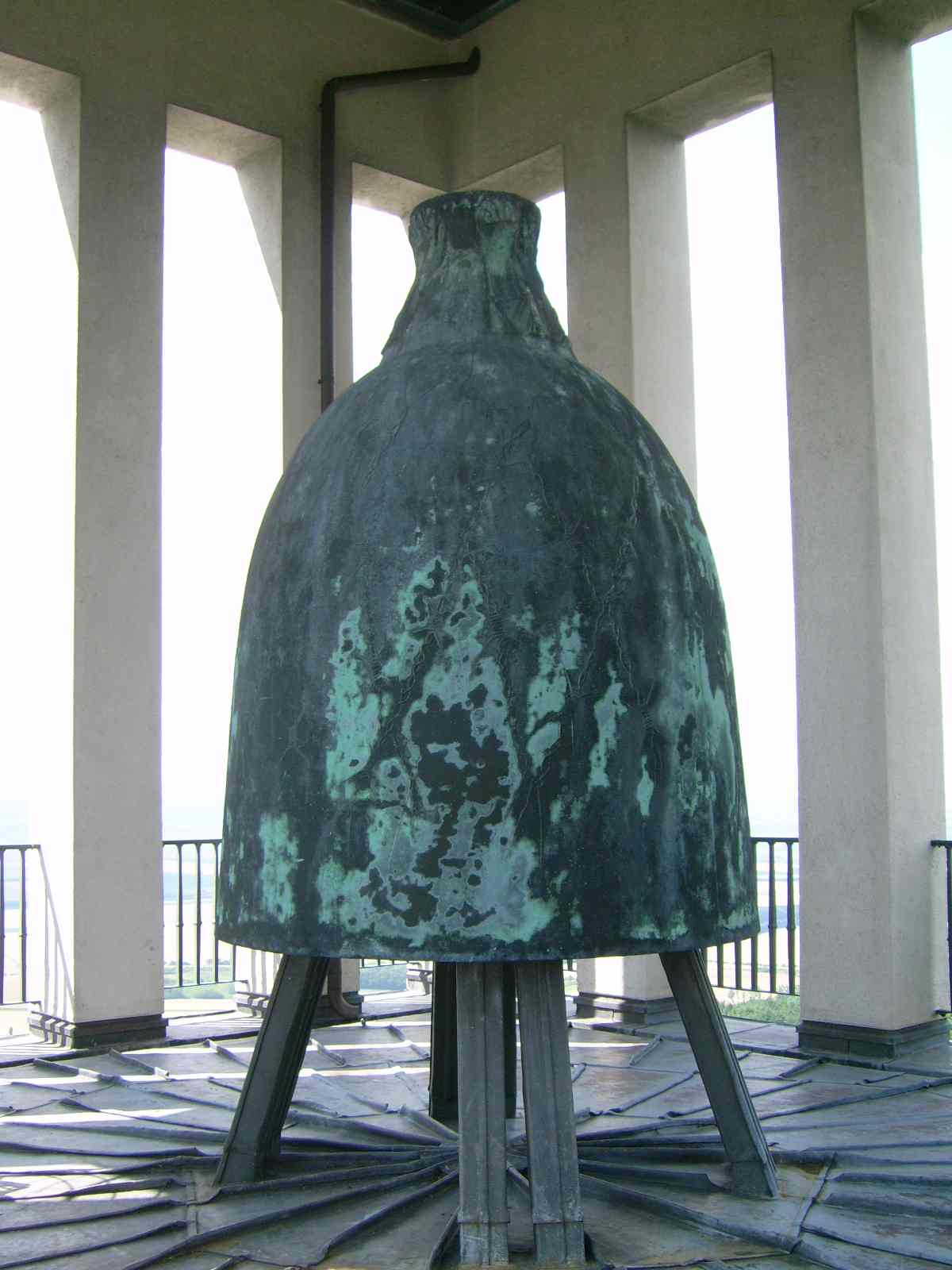 Buchenwald